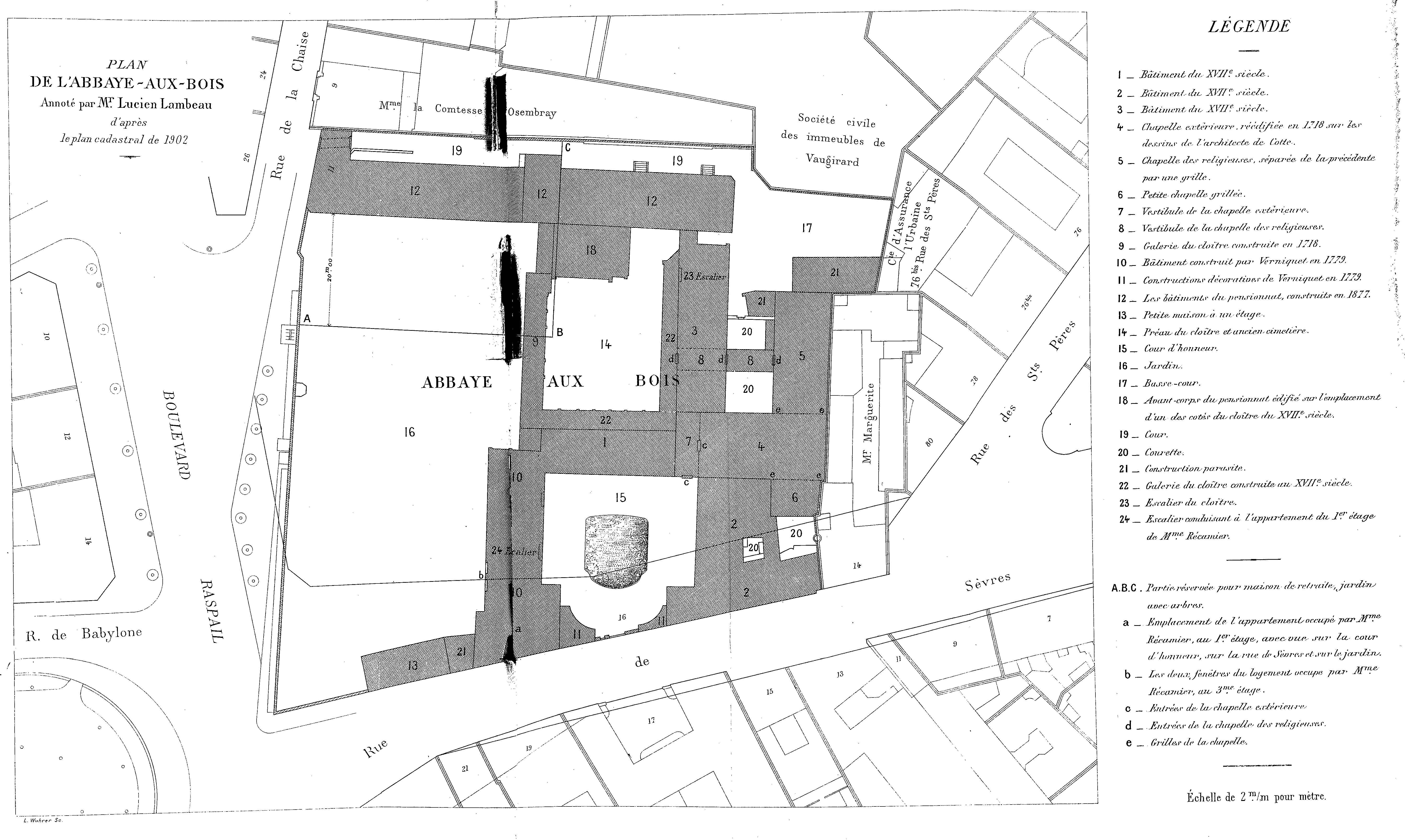 Plan de l'Abbaye-aux-Bois, extrait du procès-verbal de la Commission Municipale du Vieux Paris du 9 décembre 1905. Avec l'emplacement de l'appartement loué par Mme Récamier.